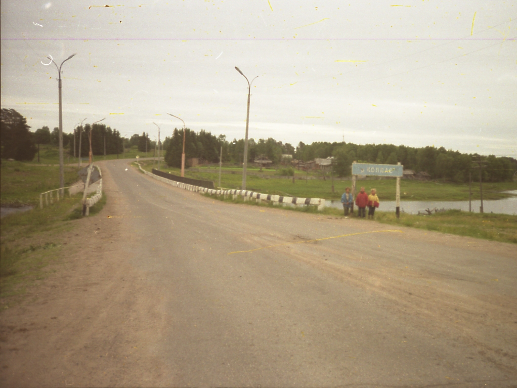 Колласйоки